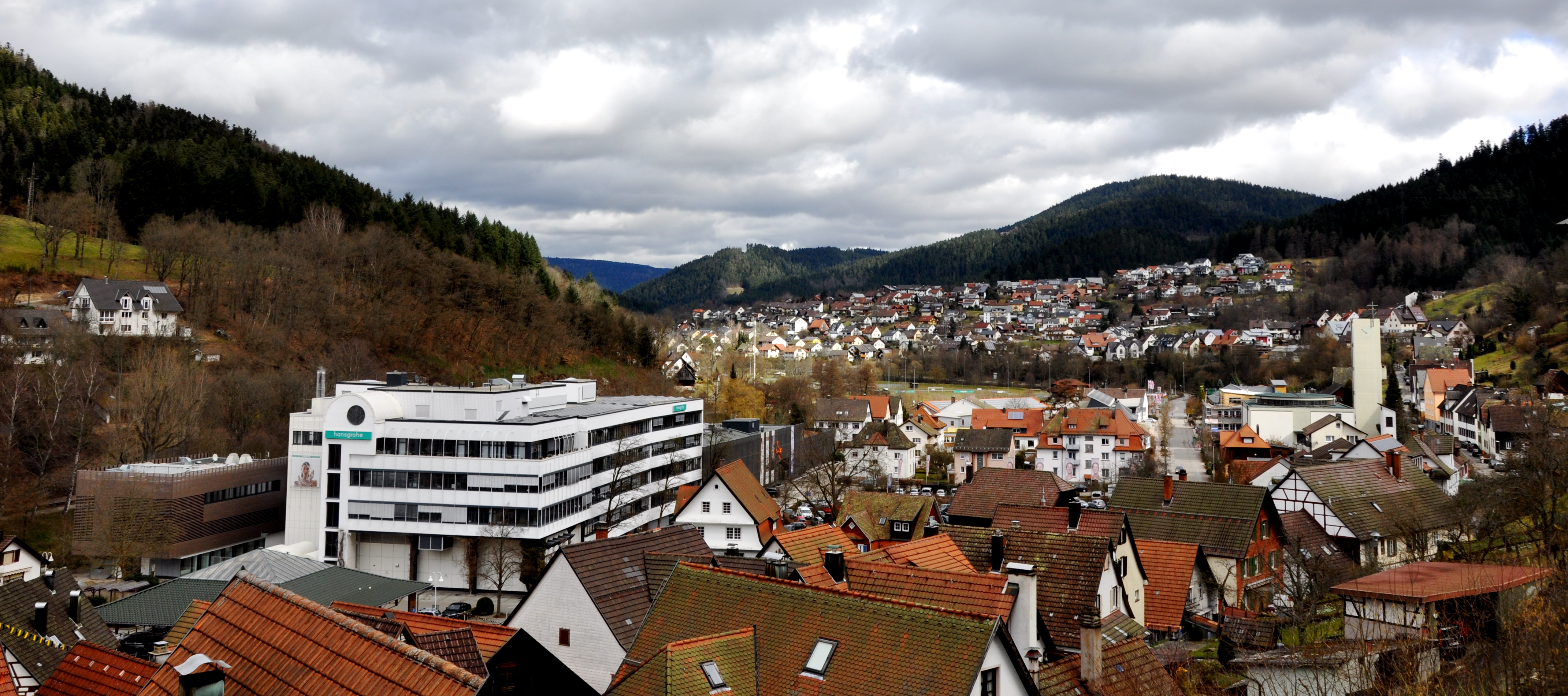 Schiltach, Blick auf die östlichen Wohngebiete